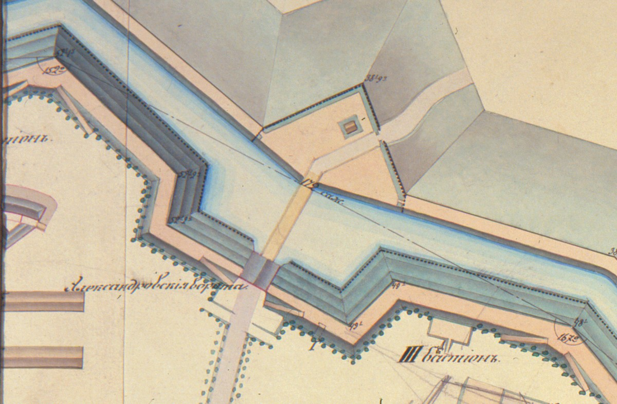 Фрагмент плана крэпасці Брэст-Літоўск. З Расійскага дзяржаўнага ваенна-гістарычнага архіва (ф.349оп4д928-2).